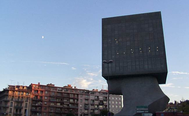 Nice-Boulevard Carabacel